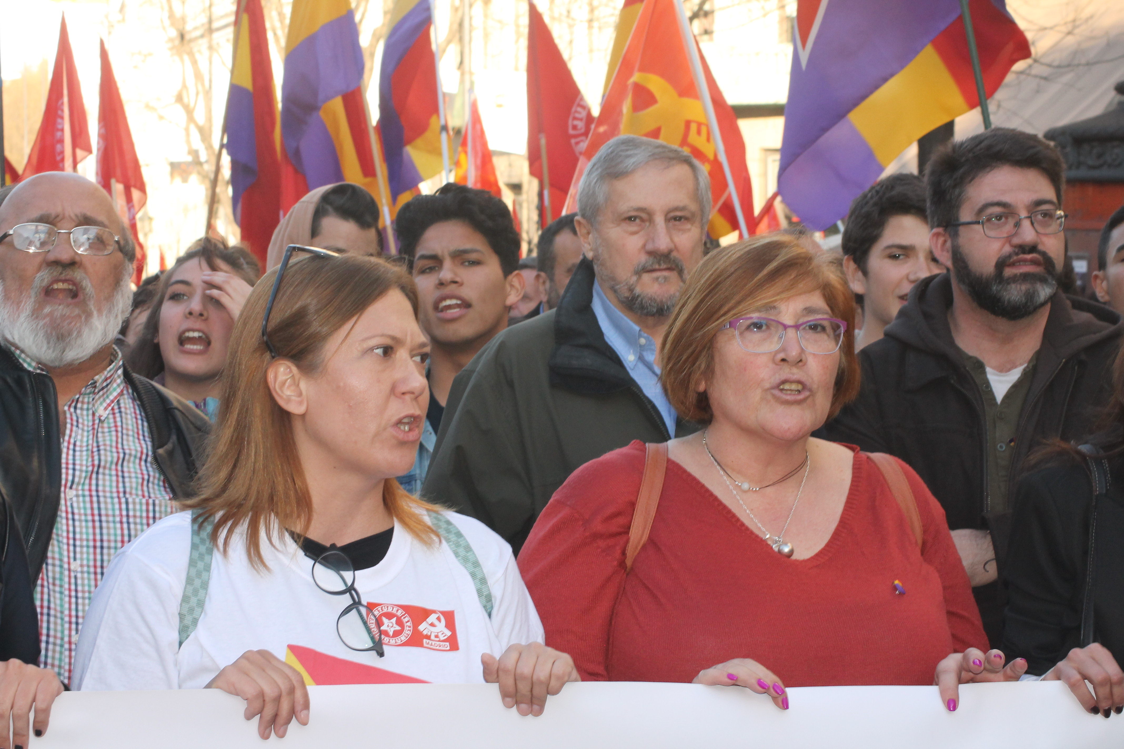 Manifestación 14 de Abril 2018